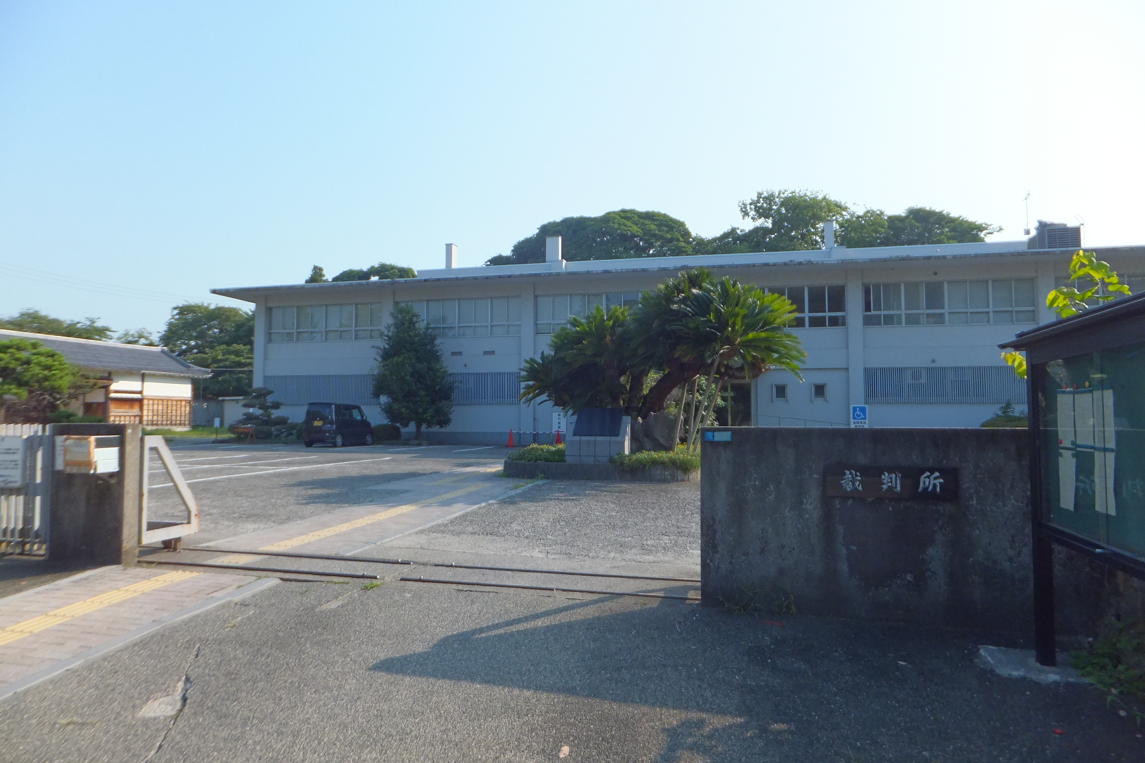 大津地方裁判所彦根支部、大津家庭裁判所彦根支部、彦根簡易裁判所